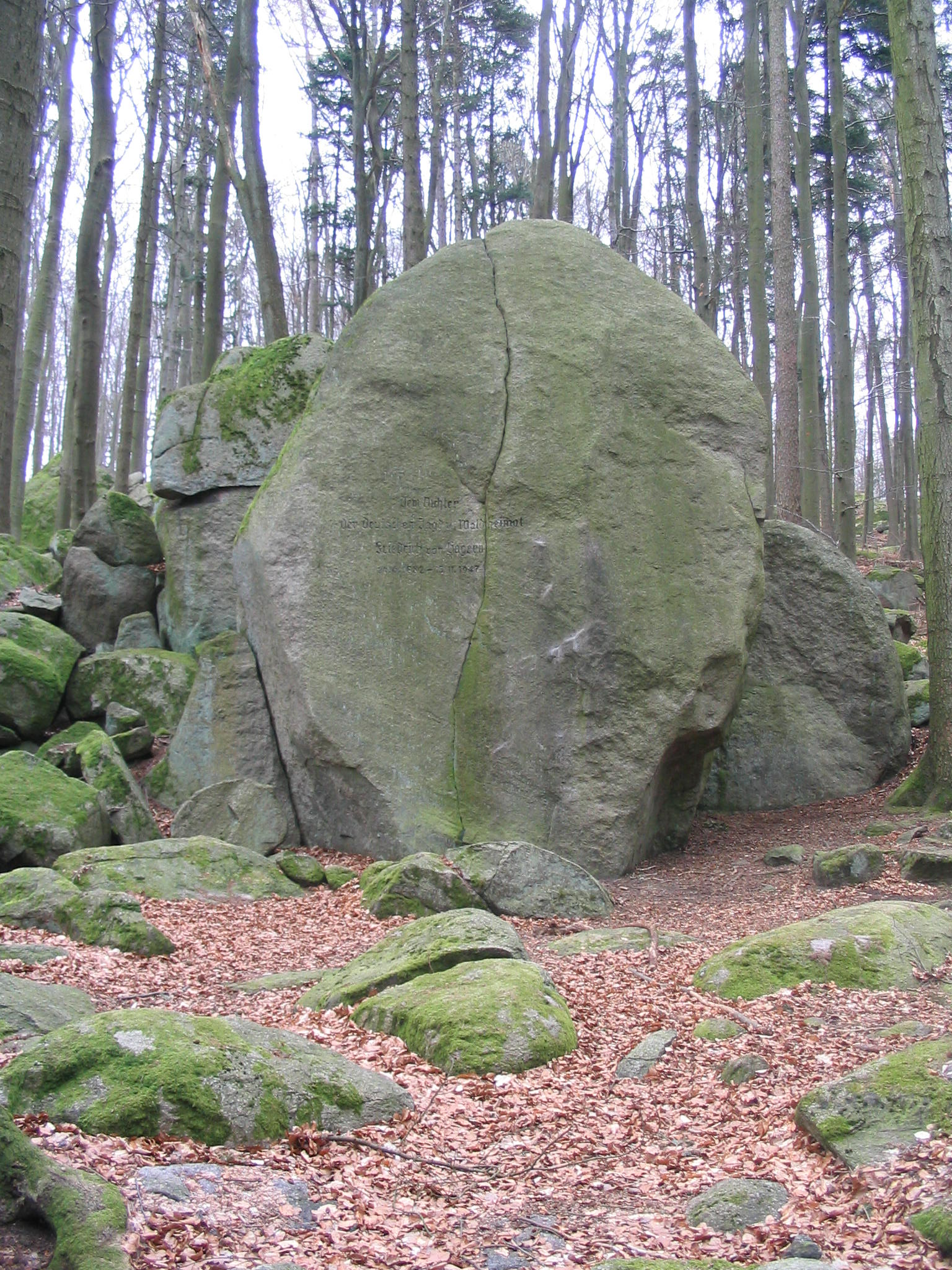 Gagernstein: als Gedenkstein verwendeter Flasergranitoid-Fels der Rimdidim" - Formationen bei Steinau (Odenwald)